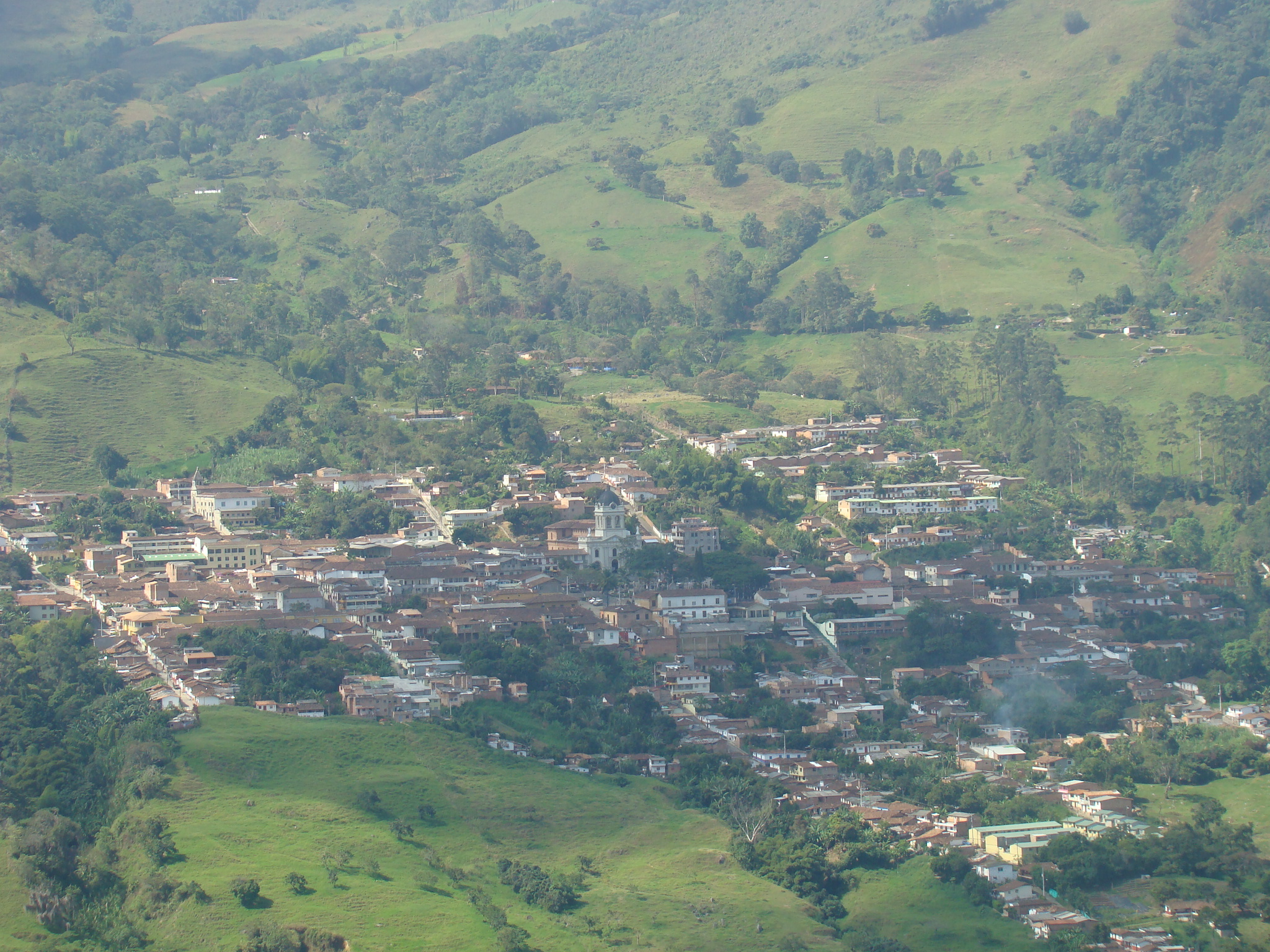 Panorámica del área urbana de Titiribí, Antioquia.